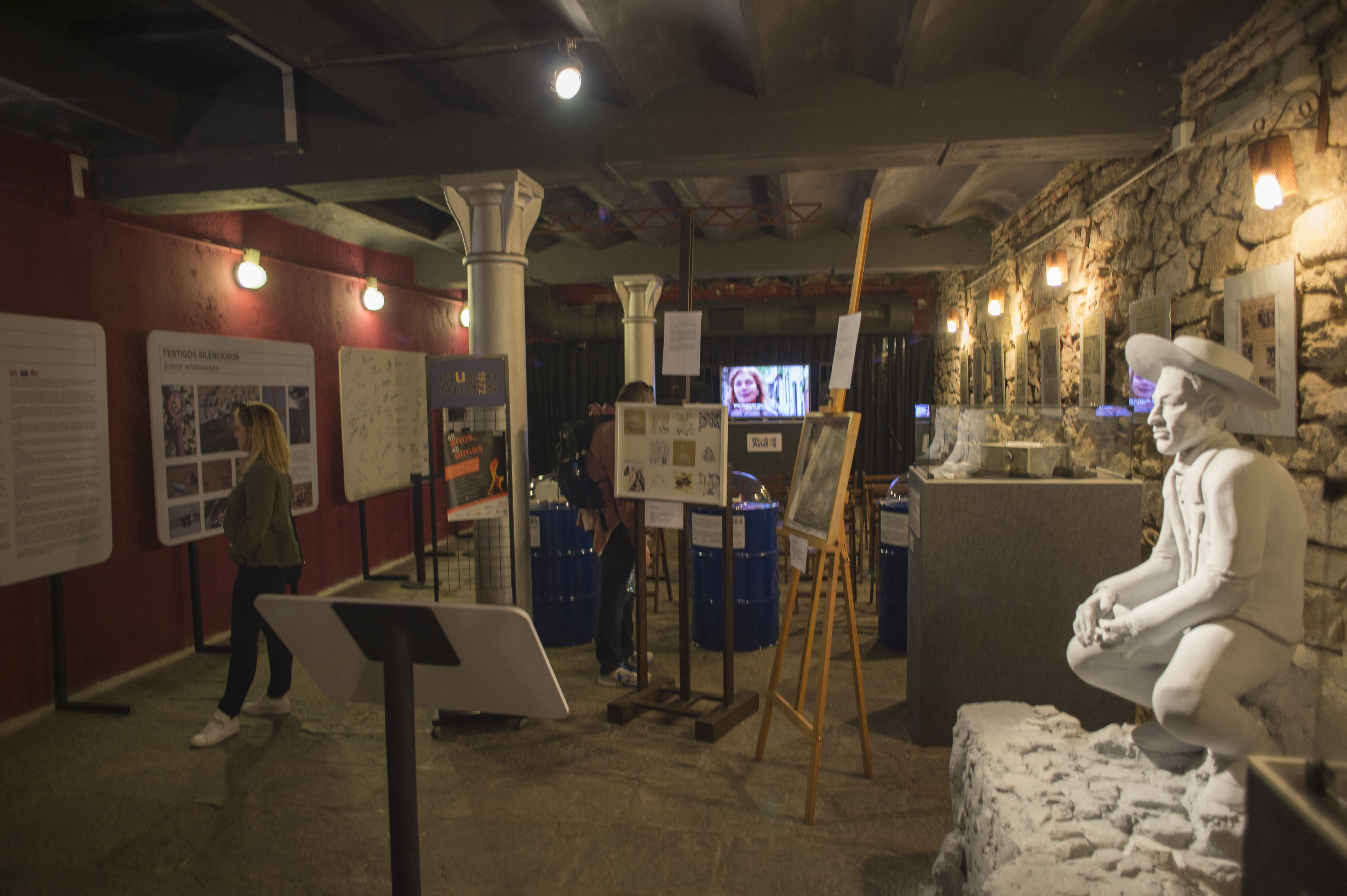 Museo del Milagro de los Andes, interior, Montevideo, Uruguay